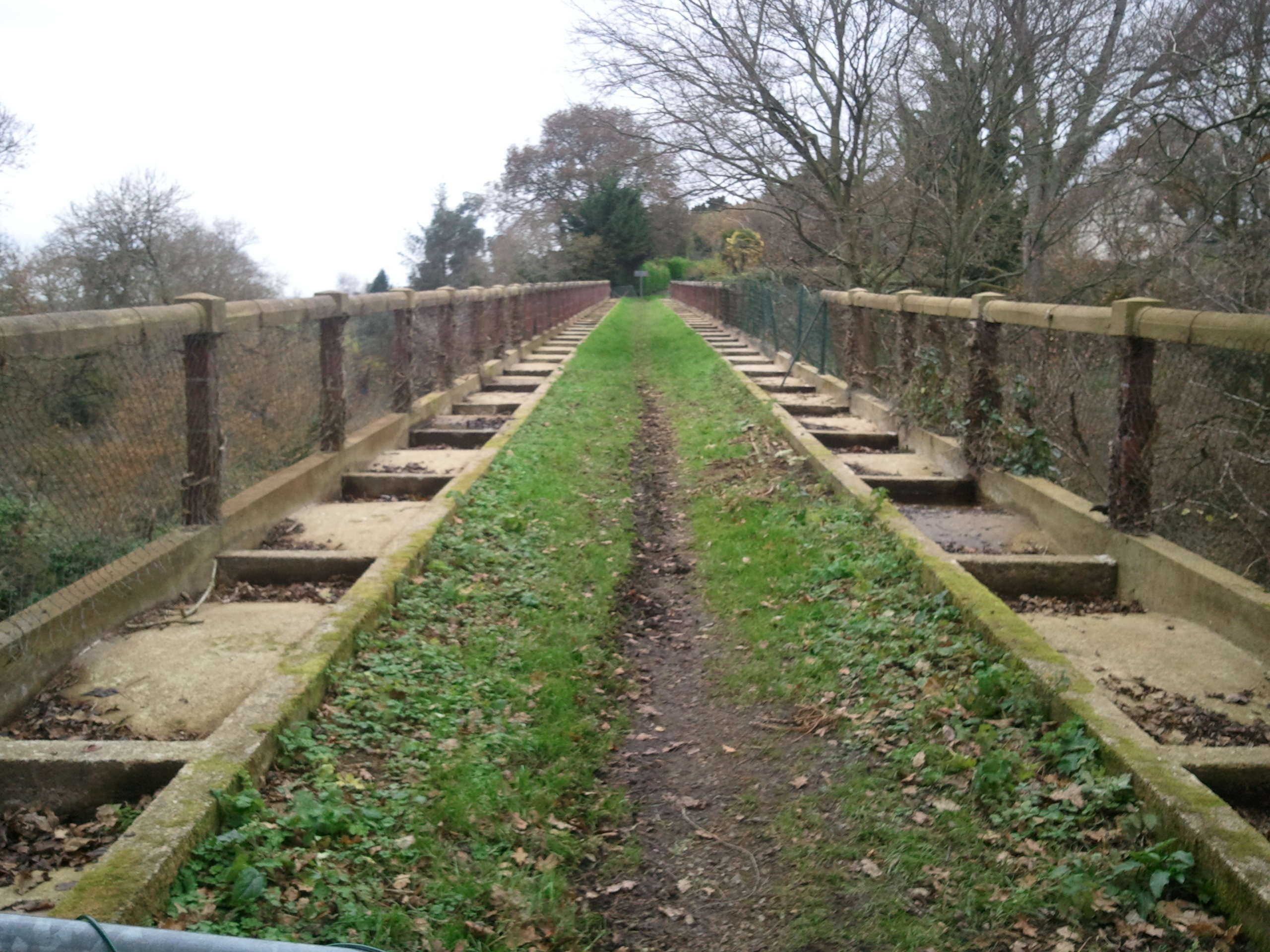 Tablier du viaduc de Kerdeozer, Plouguiel, France, 12/2012